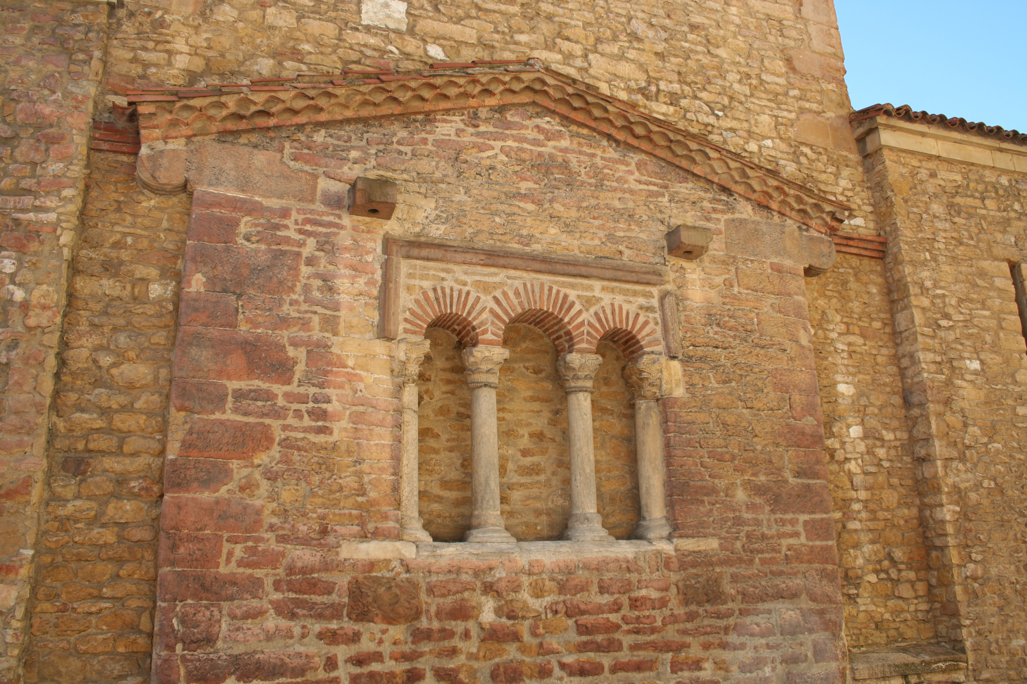 Testero de la capilla mayor de la iglesia de San Tirso en Oviedo